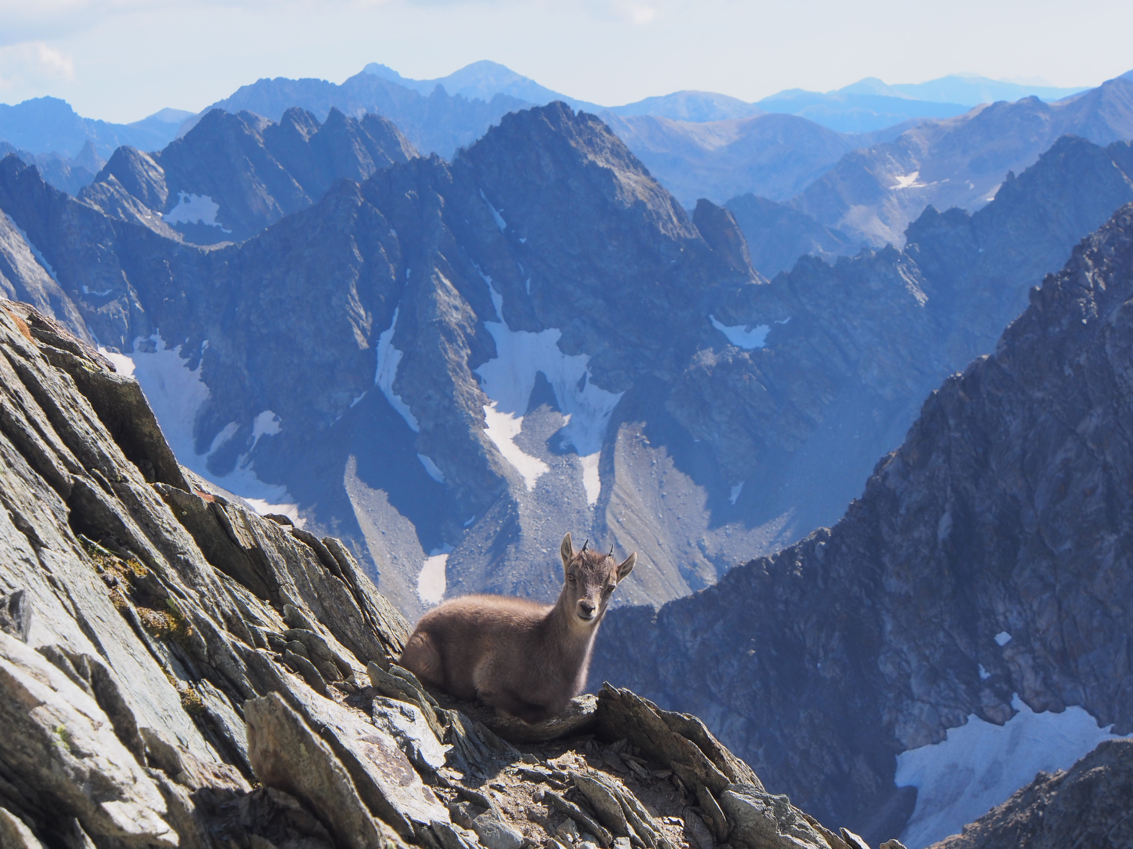 Alpi Marittime (Q47091959)